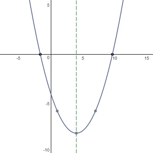 Parabel (gif)